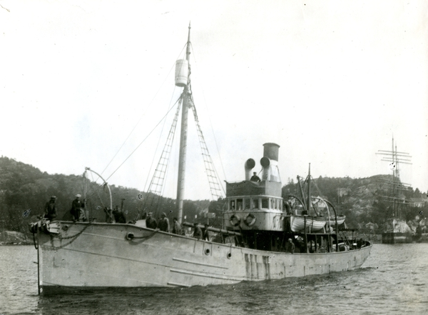 Hvalfanger-D/S Dias (Ex. Kapduen, Viola)(b. 1906, Cook, Welton & Gemmell Ltd., Beverley)